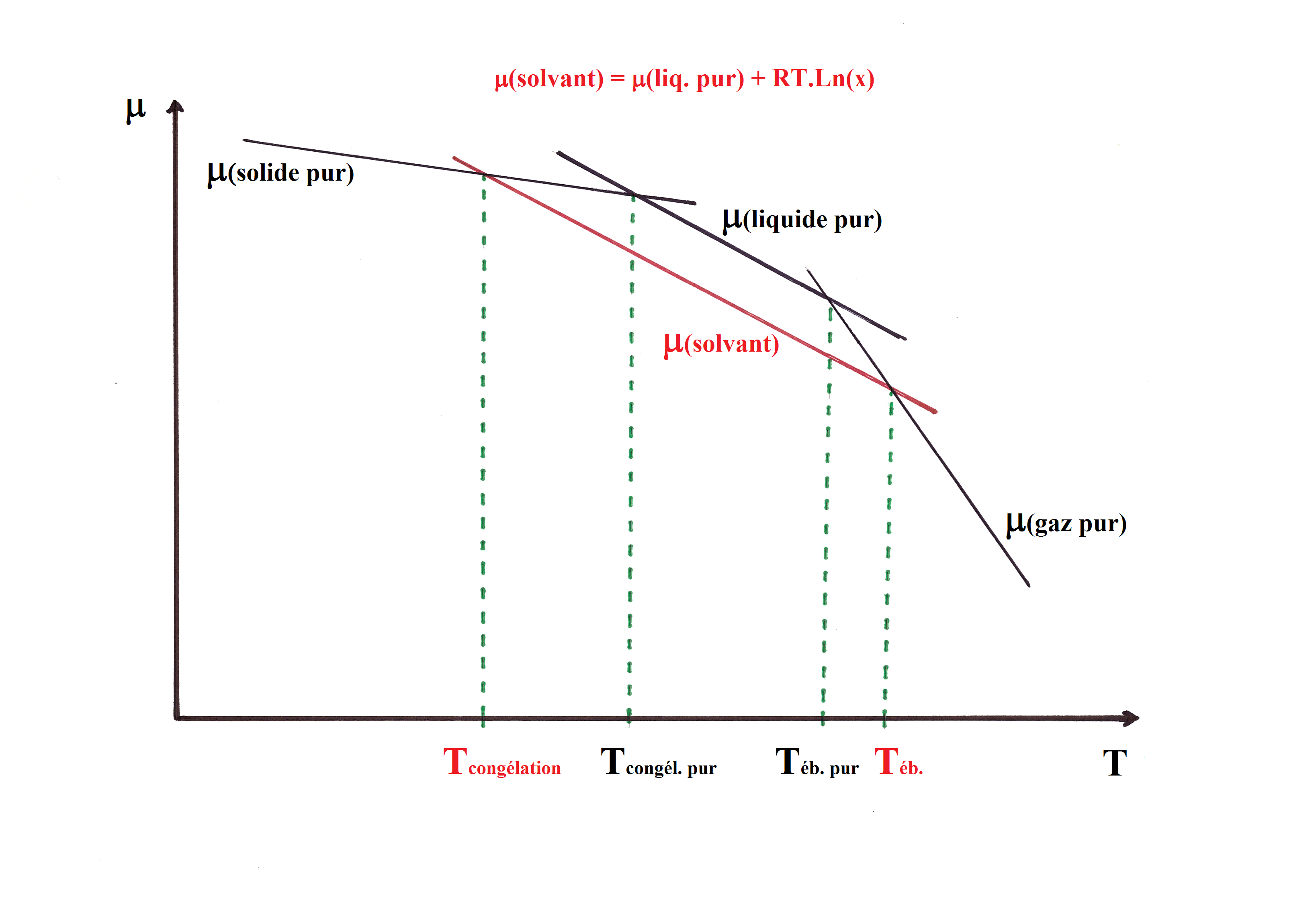 propriétés colligatives - potentiel chimique µ en fonction de la température T - cryoscopie - ébullioscopie